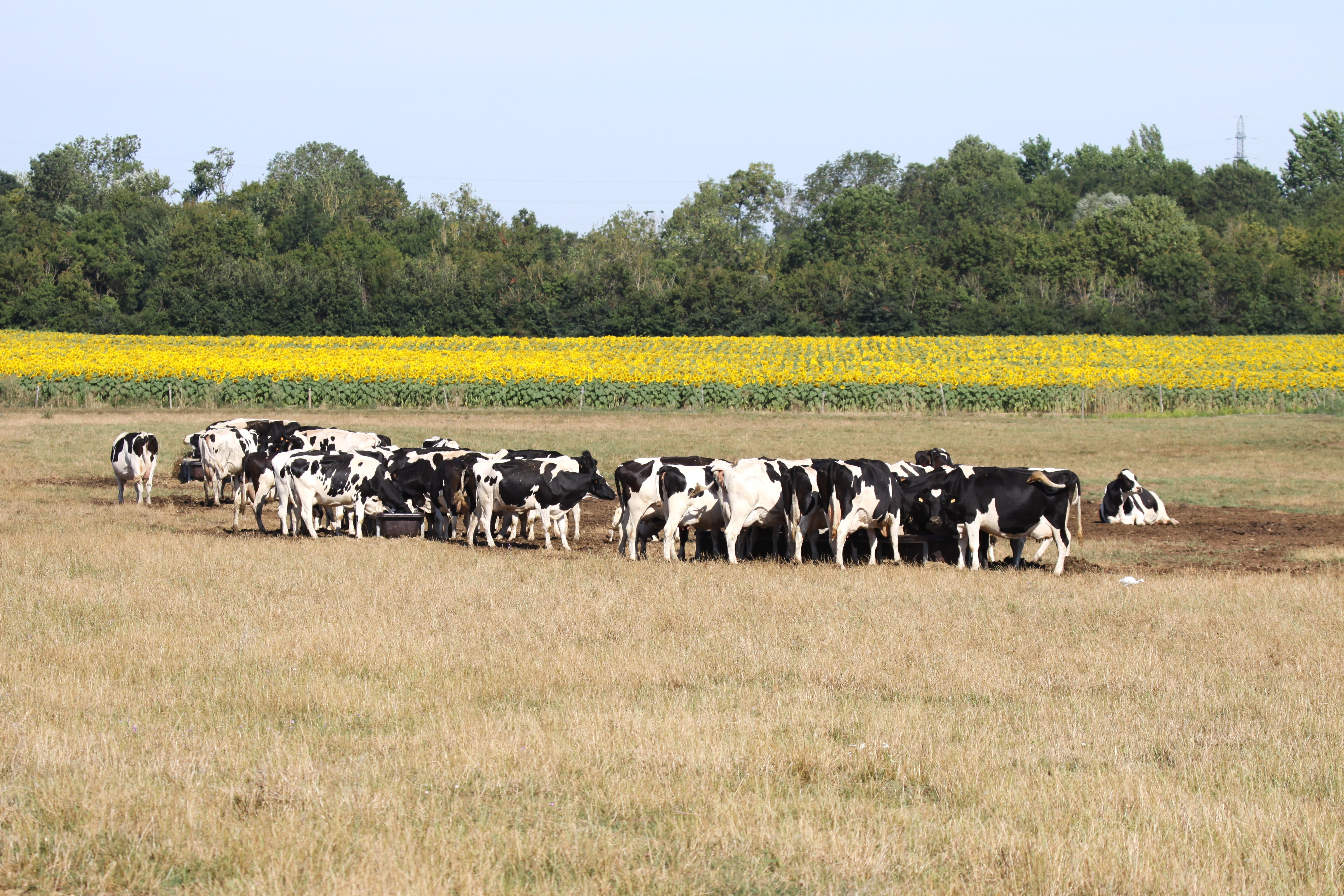 Bétail élevé par le Ferme de Gramont: vaches laitières de race Holstein à la robe pie noire. Ferme de Gramont, Fief des Lapins, Chemin de Bel Air, La Sauzaie, Saint-Xandre, Charente-Maritime, France.